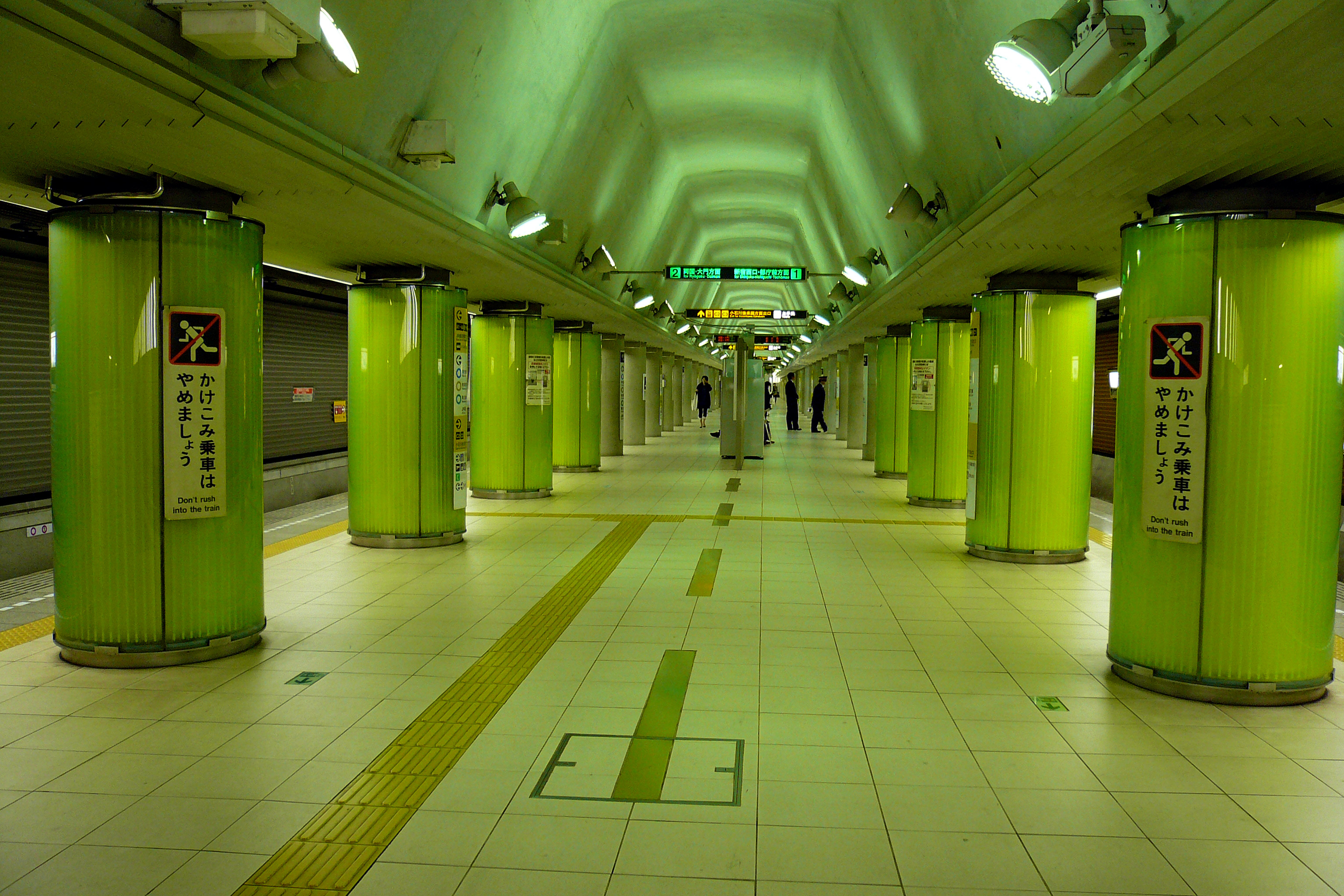 IIdabashi station, Tokyo, Japan